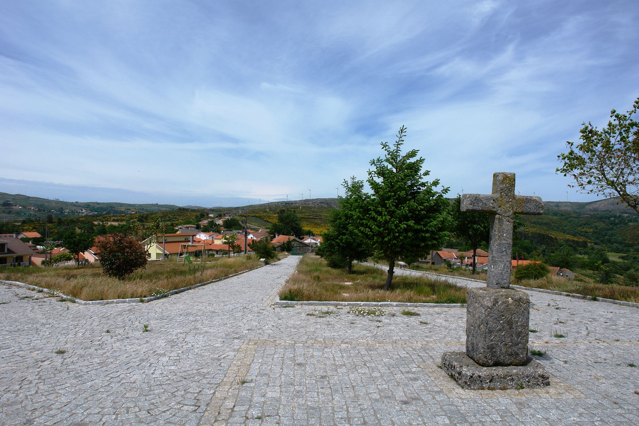 Torrão